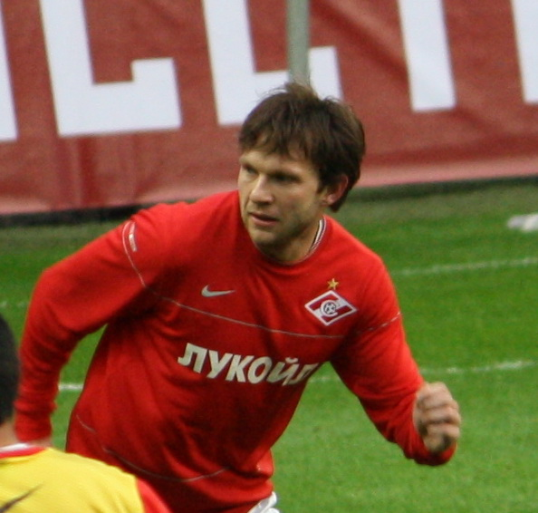 Ivan Saenko